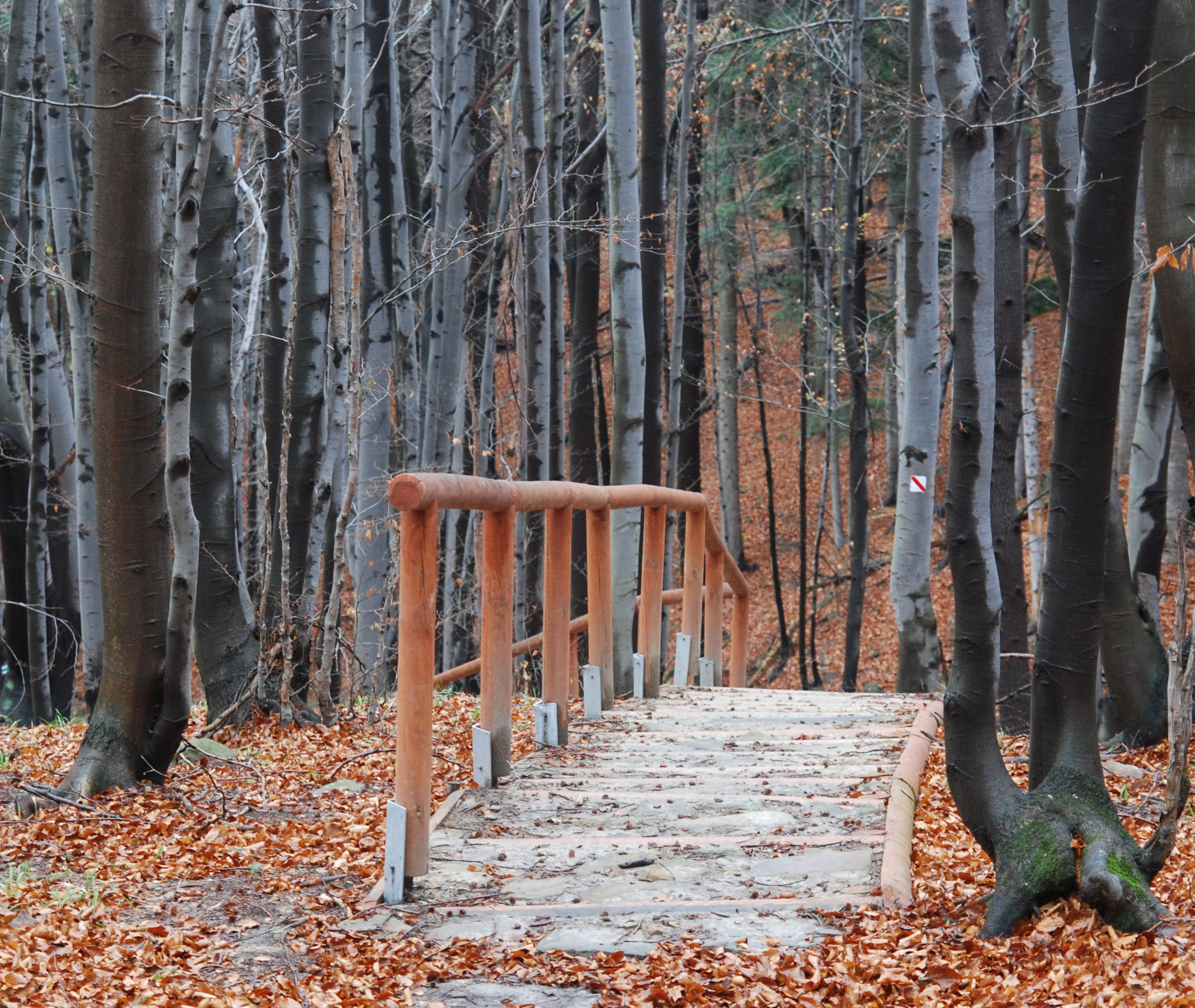 wieś Żydowskie